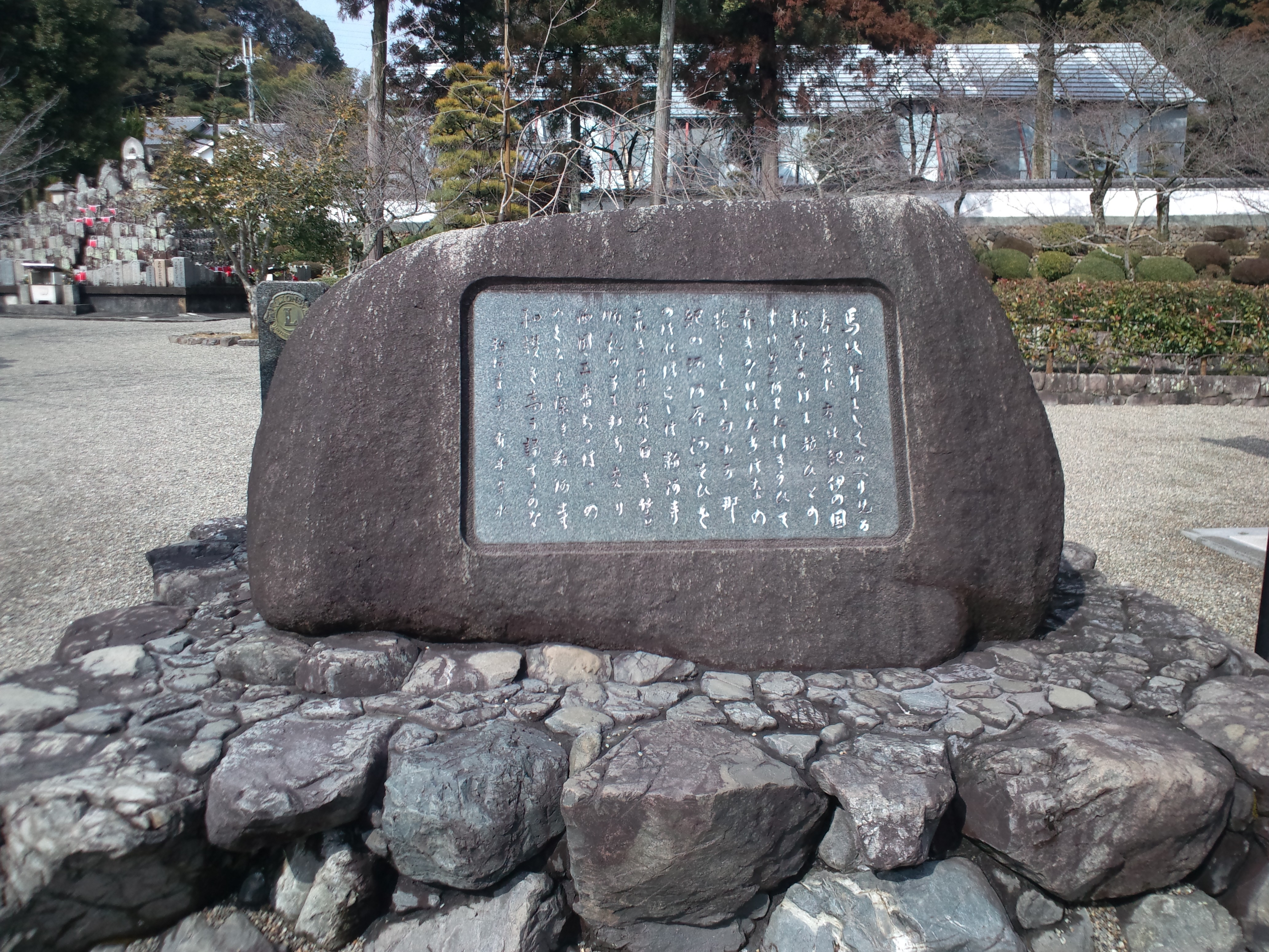 粉河寺 有本芳水の石碑